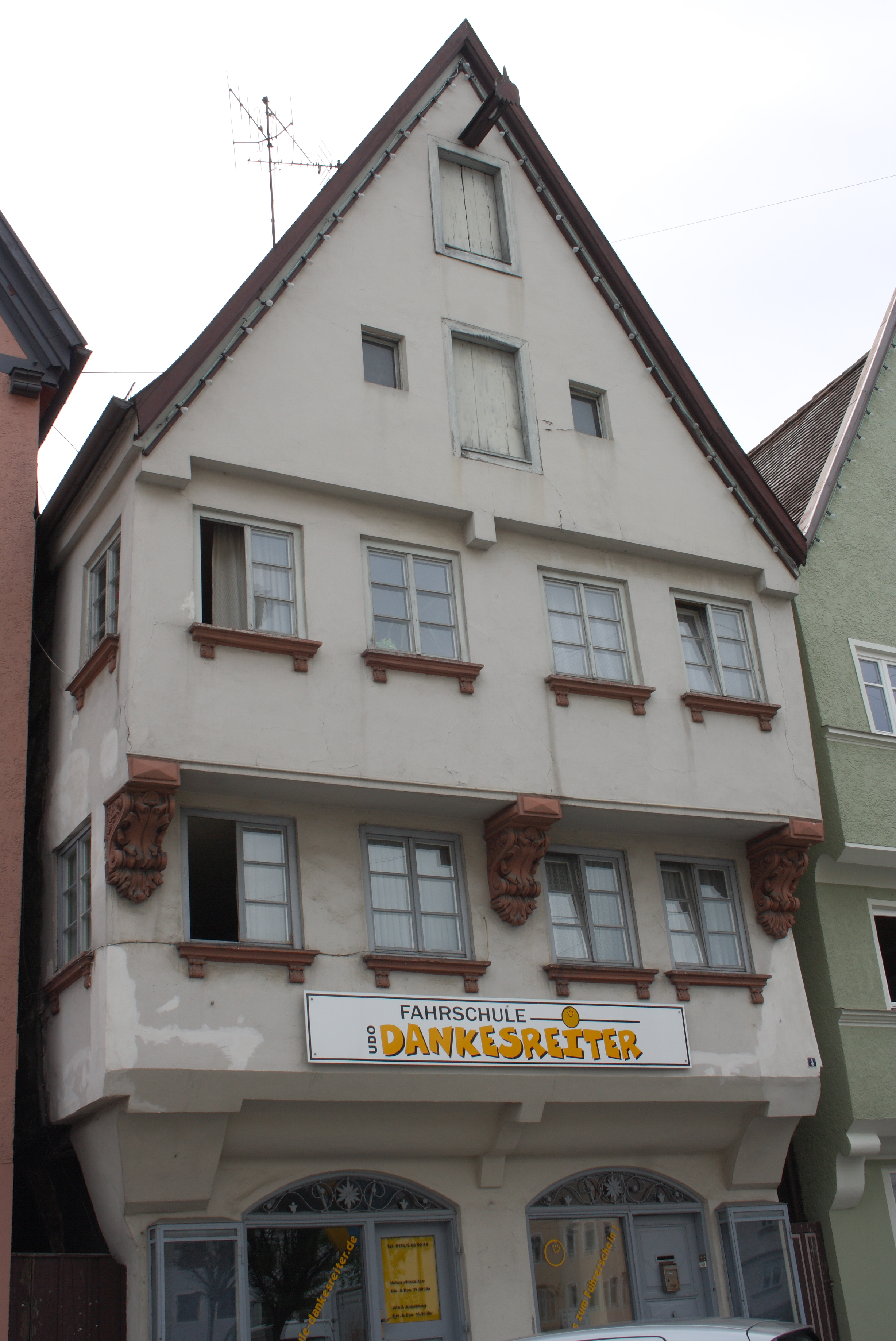 Bürgerhaus in Lauingen im Landkreis Dillingen an der Donau (Bayern), Imhofstraße 4, verputztes Fachwerk